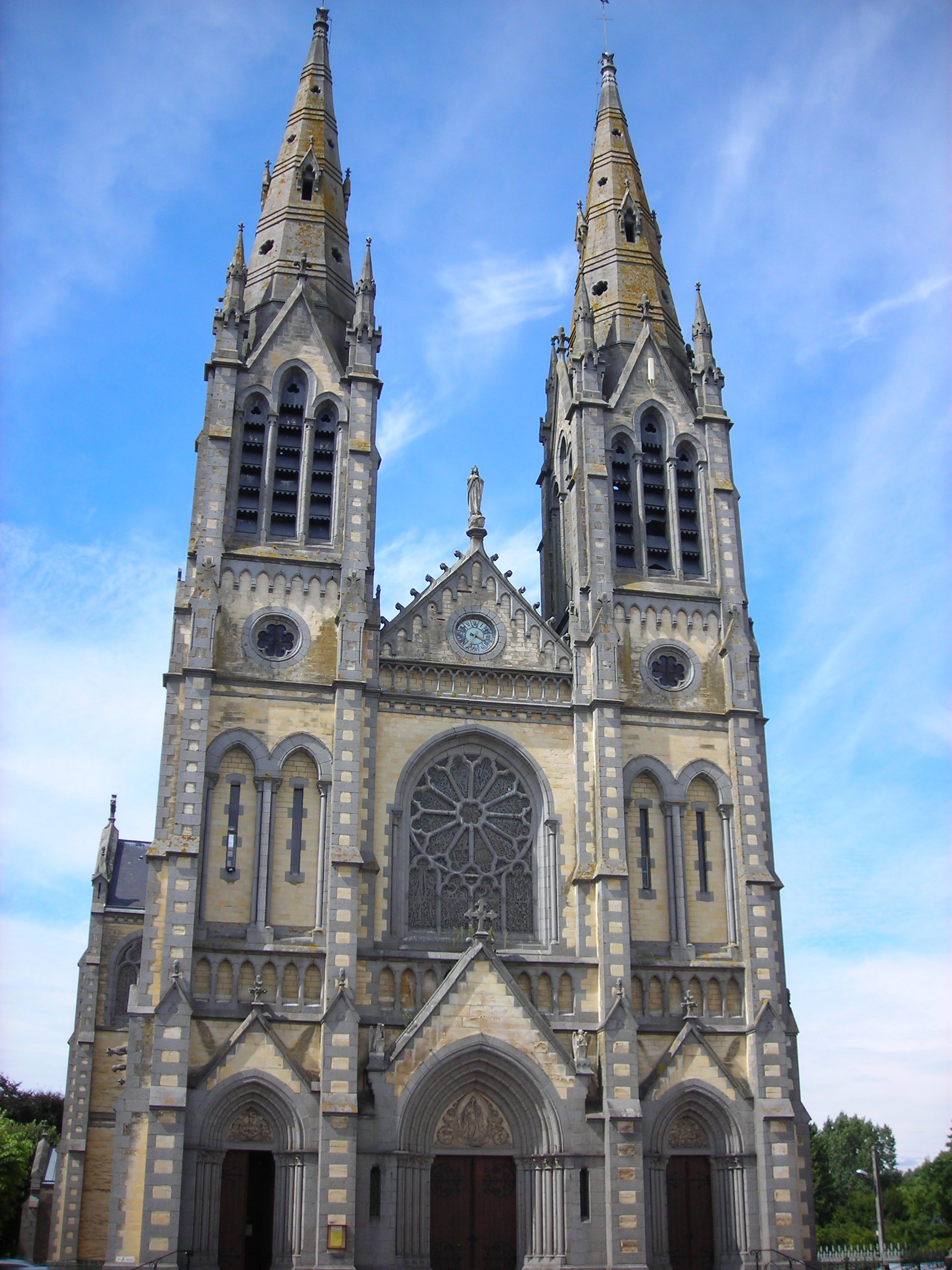 L'église Notre Dame à Vimoutiers (Orne, France, Europe)